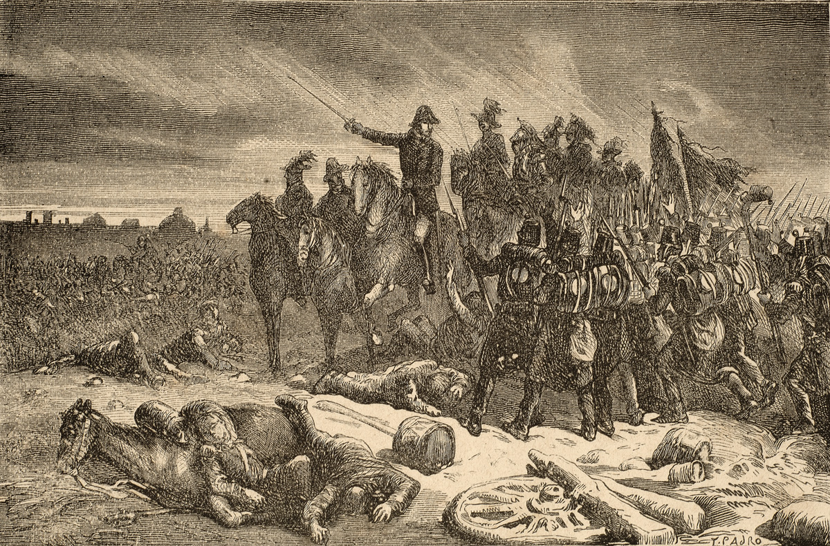 Baldomero Espartero eta tropa liberala Lutxanako guduan (1836).